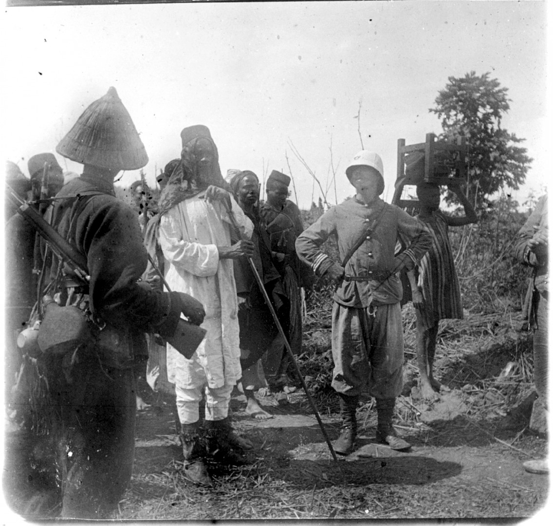 Le capitaine Gouraud et Samory Touré prisonnier, Faran Oualia (Guinée), 16 octobre 1898. Photographie d'Henri Gaden